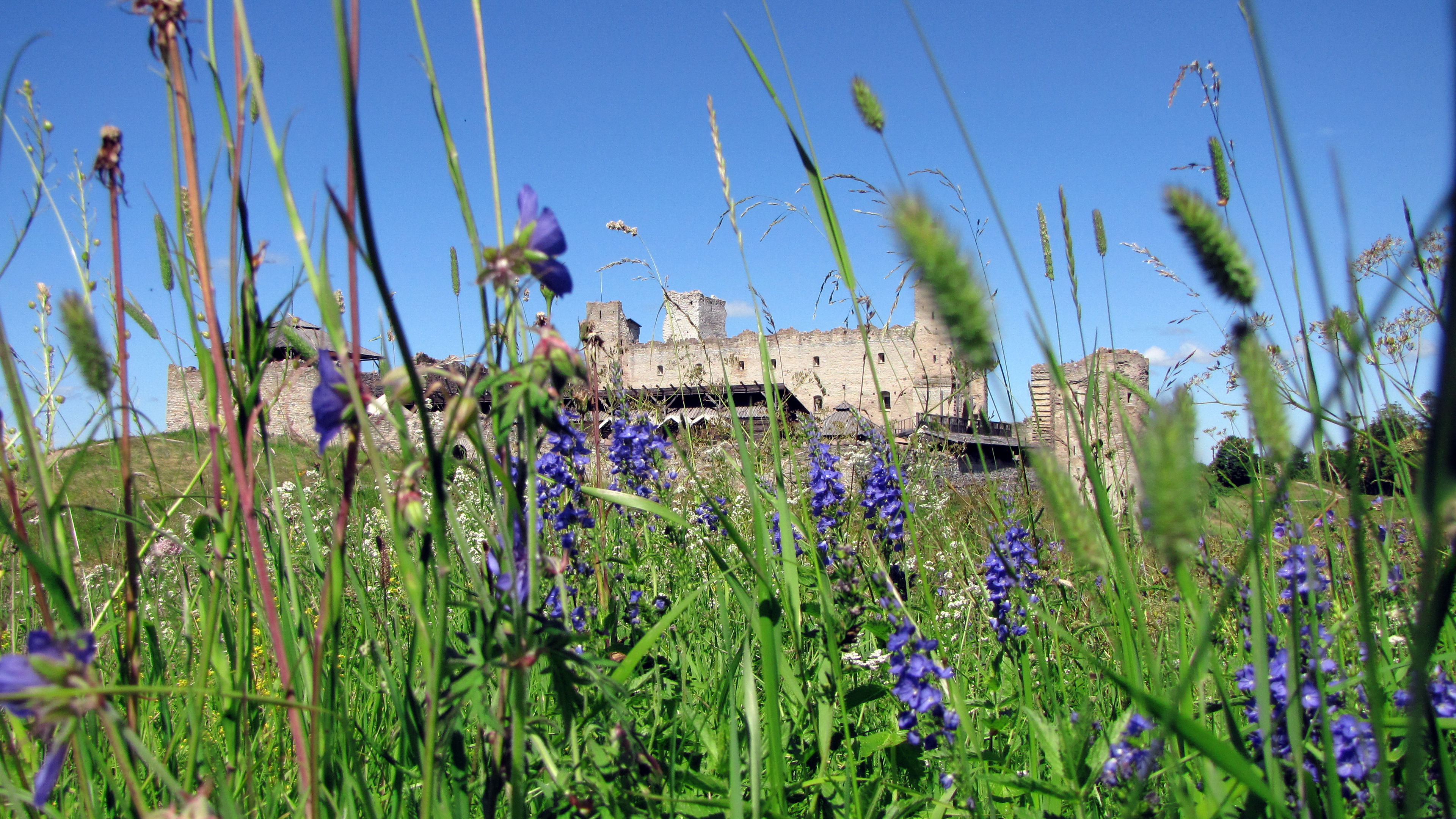 Rakvere linnuse varemed